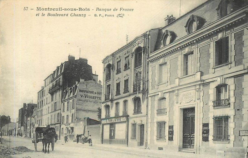 Boulevard Chanzy à Montreuil-sous-Bois